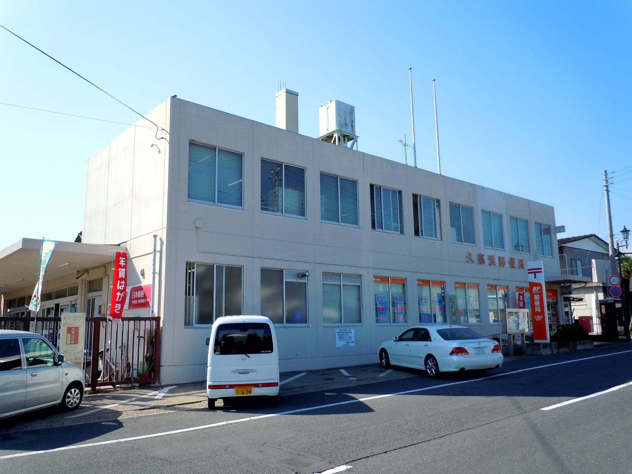 久慈浜郵便局